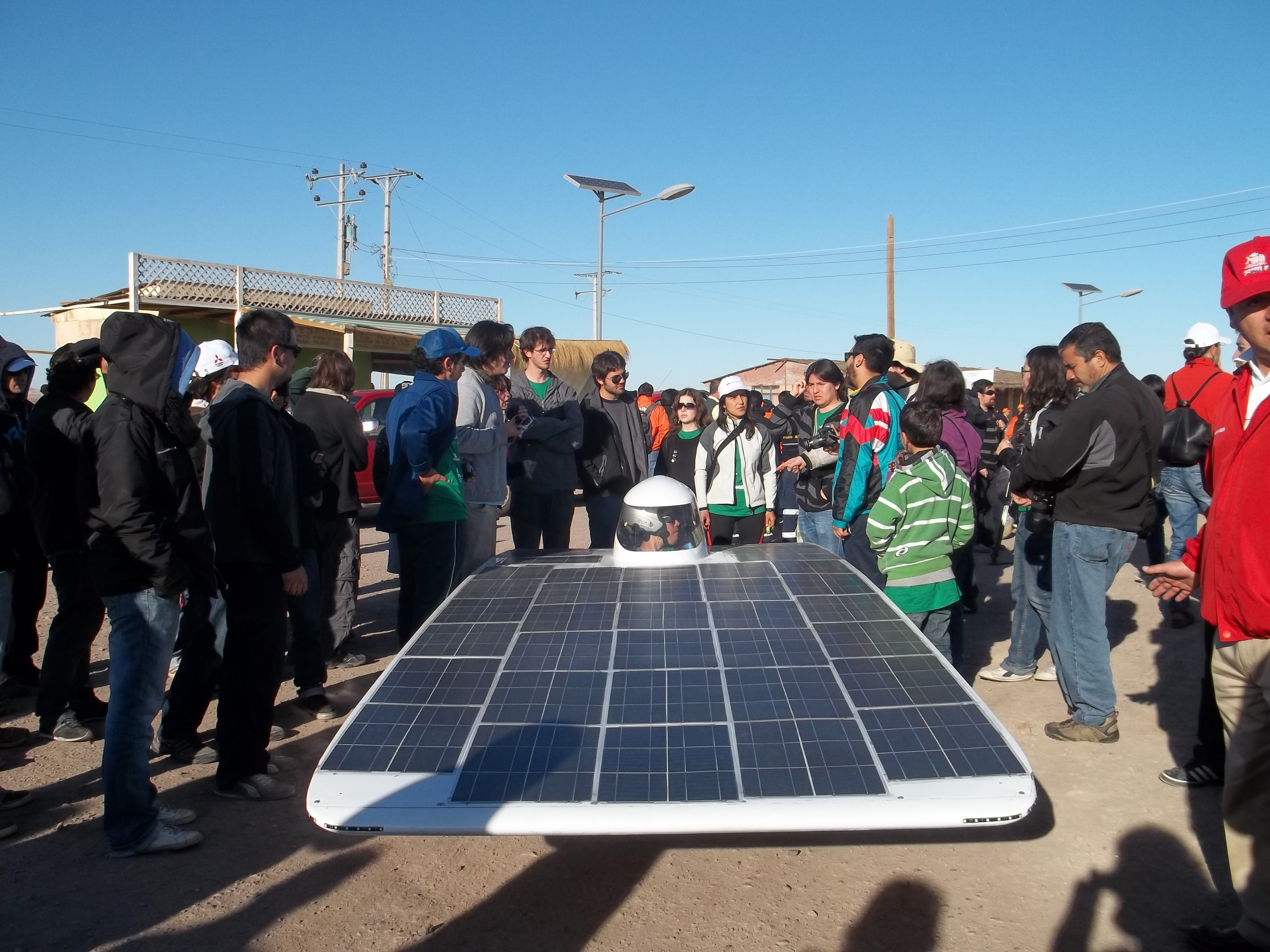 Equipo Eolian2, de la Universidad de Chile, previos a comenzar la carrera de autos solares Atacama Solar Challenge 2011